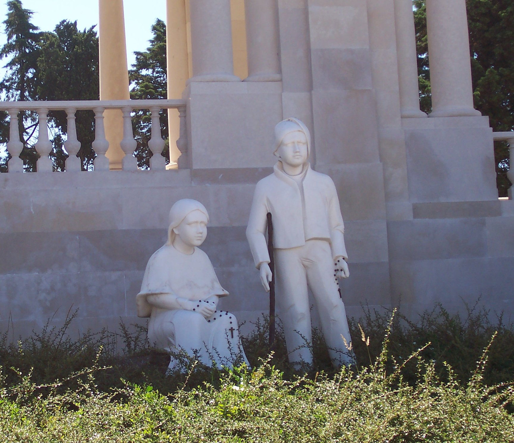 Obra de Graça Costa Cabral, Santuário de Fátima